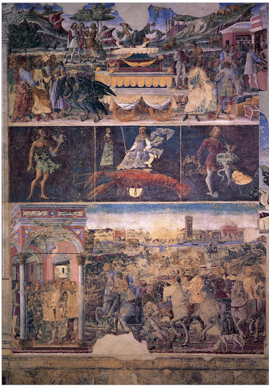 Schifanoia, il mese di giugno, con particolare di Mercurio (da: Il salone dei mesi a Palazzo Schifanoia, Ferrara